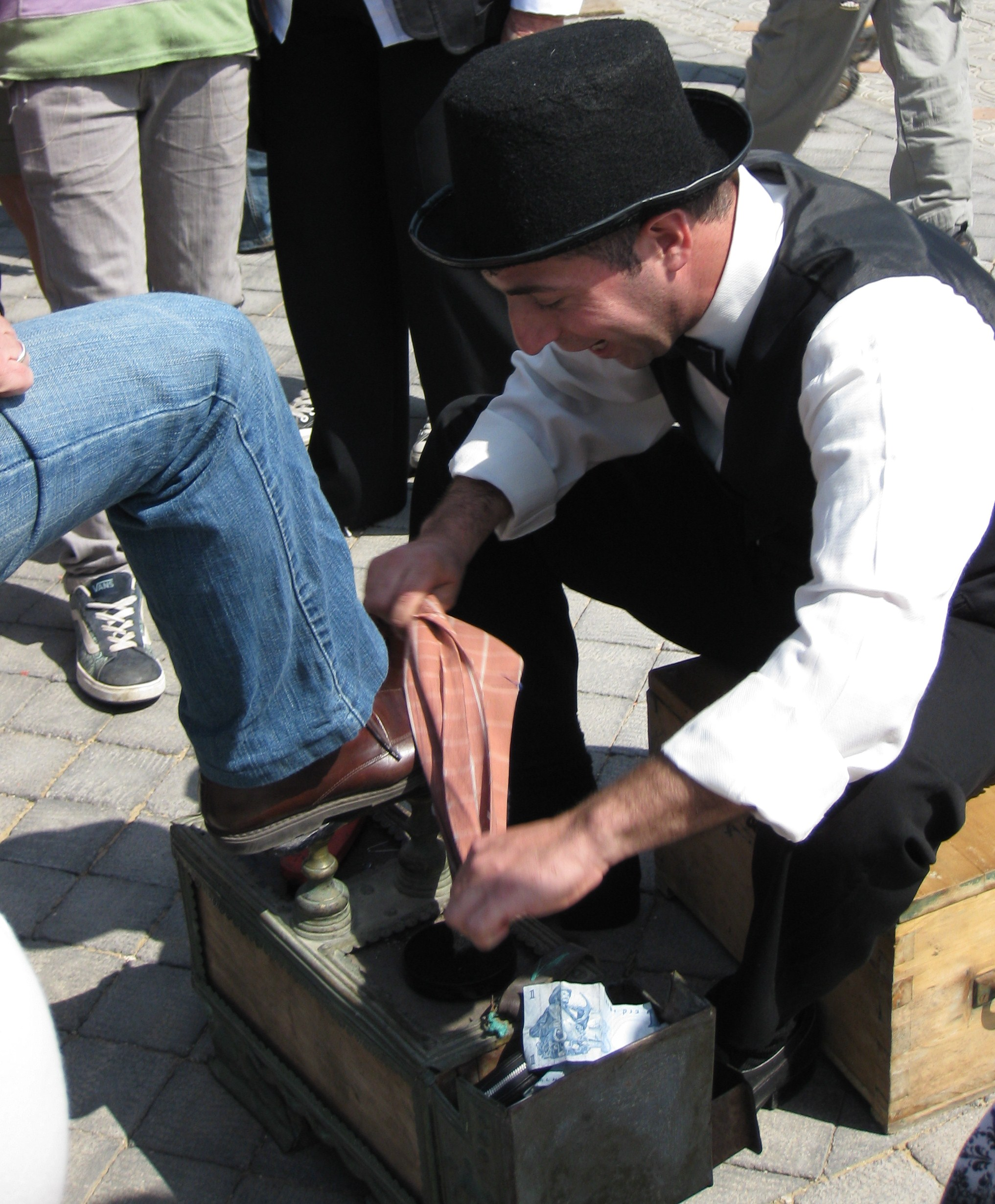 Tel Aviv 100th anniversary - Centennial Photo חגיגות המאה לתל אביב - אירוע צילום המאה במתחם התחנה בתל אביב